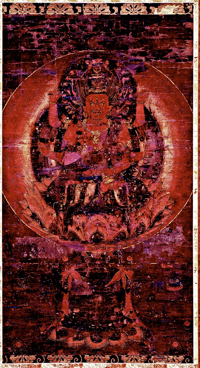 福王寺(佐久市)の愛染明王掛け軸